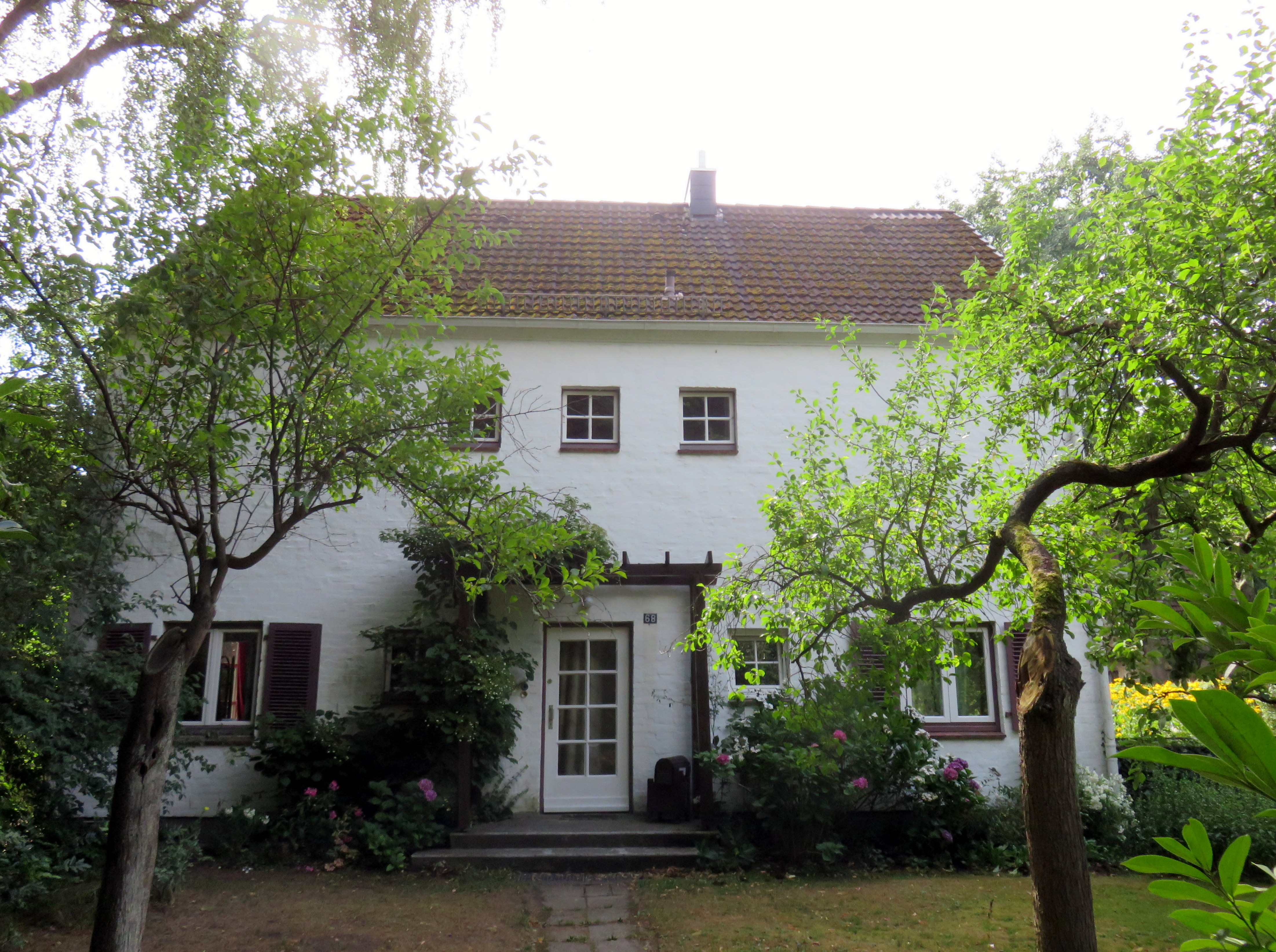 Doppelhaus Wellingsbütteler Landstraße 68 in Hamburg-Wellingsbüttel, das 1950/1951 von der Hamburger Malerin Ilse Tesdorpf-Edens (1892-1966) gemeinsam mit ihren Mäzenen, dem Ehepaar Walter und Olga Reimers, errichtet worden war. Der Vater der Künstlerin (John Daniel Tesdorpf) war ein Cousin der Hamburger Malerin Ebba Tesdorpf.